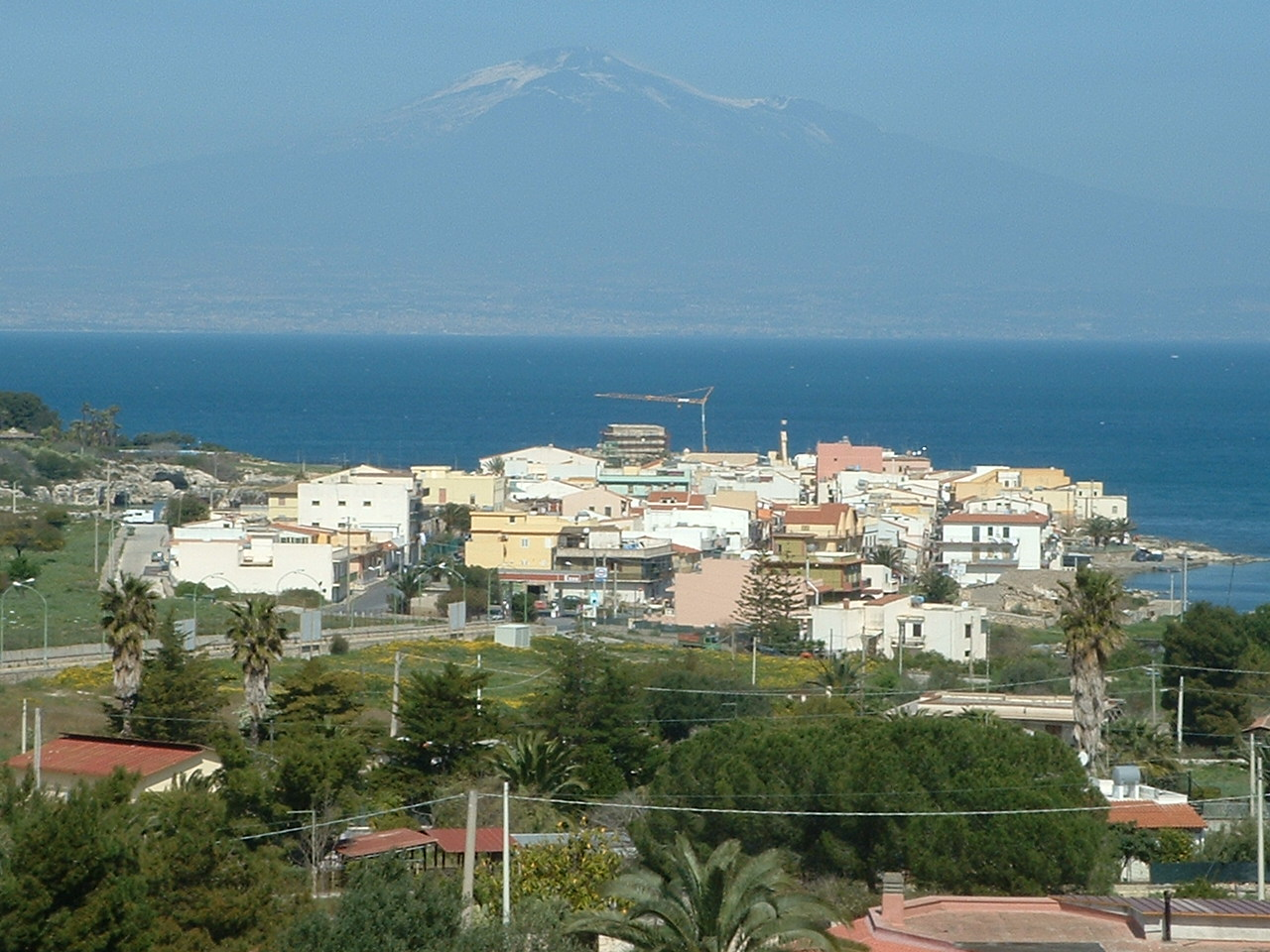 Brucoli(Augusta -SR) Panorama con monte Etna sullo sfondo